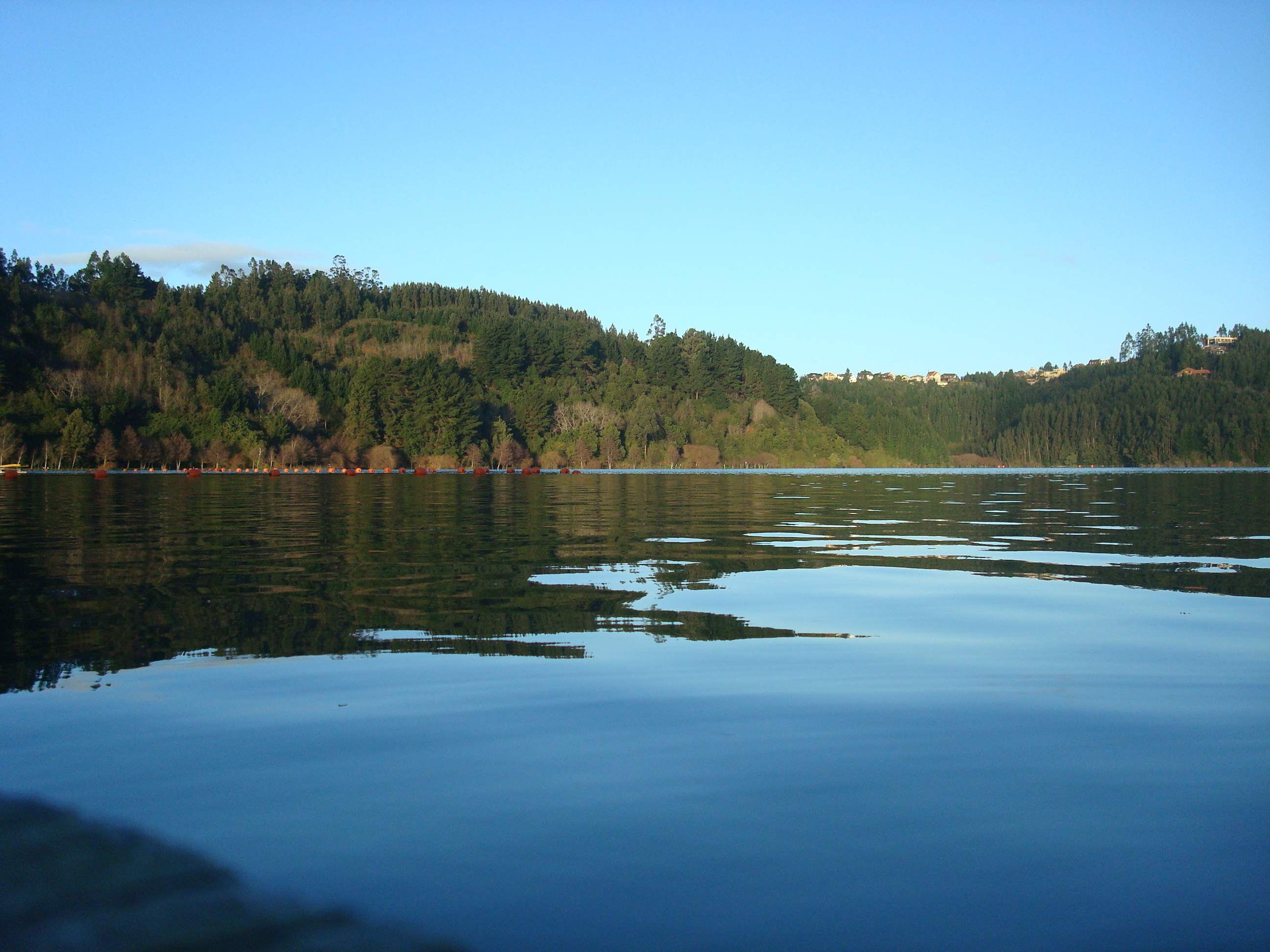 Laguna Chica, en la Villa San Pedro comuna de San Pedro de la Paz Provincia de Concepción, Región del Biobío, Chile Julio de 2010